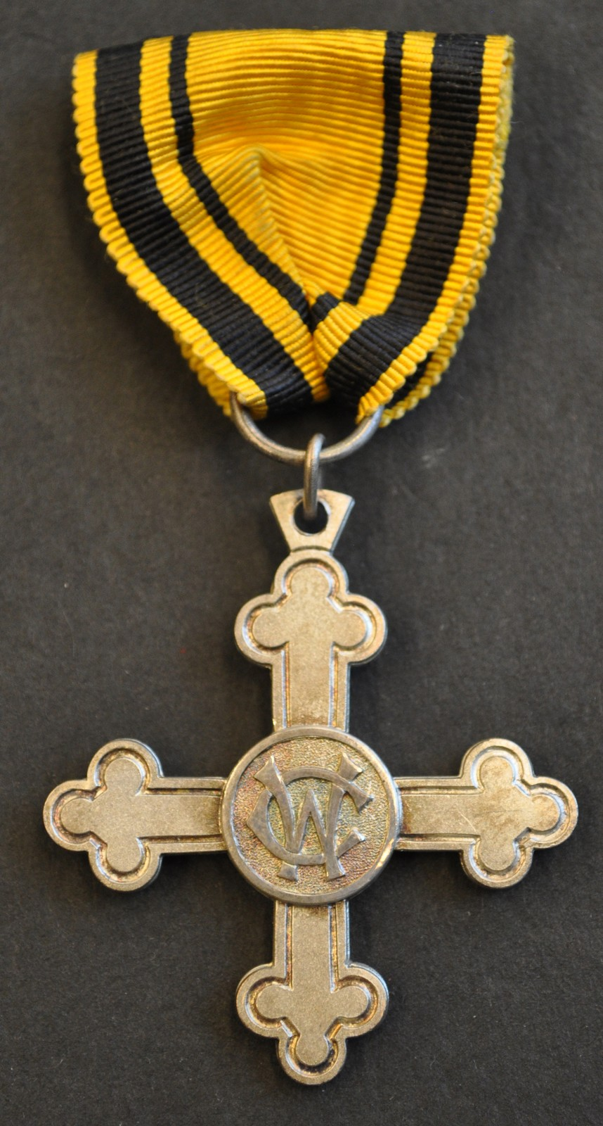 Fritz (Friedrich) Kehrer, geb.: 09.08.1890 Tübingen, war zunächst Lehrer in Wart / Nagold. Er wurde Leutnant d. Reserve und Adjutant im Württembergischen Gebirgsbataillon, bei dem er zum Regiments-Stab (5. Komp) gehörte. Er starb am 27.05.1918 in der Schlacht von Chemin des Dames (Pargny). Fritz Kehrer erhielt in seiner Dienstzeit 2 Ordensspangen und 6 verschiedene Orden, darunter das Eiserne Kreuz 1. Klasse, die mit ihren originalen Behältern überliefert sind.